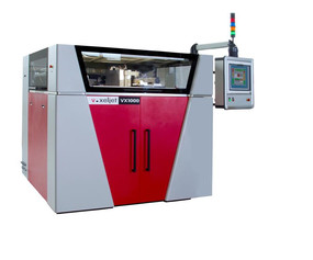 voxeljet 3D-Drucksystem VX1000